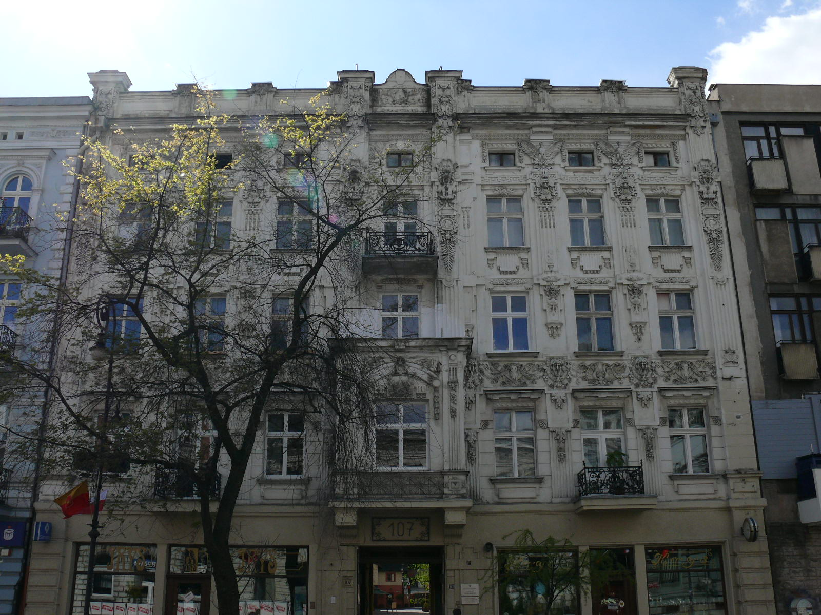 Kamienica Piotrkowska 107 w Łodzi